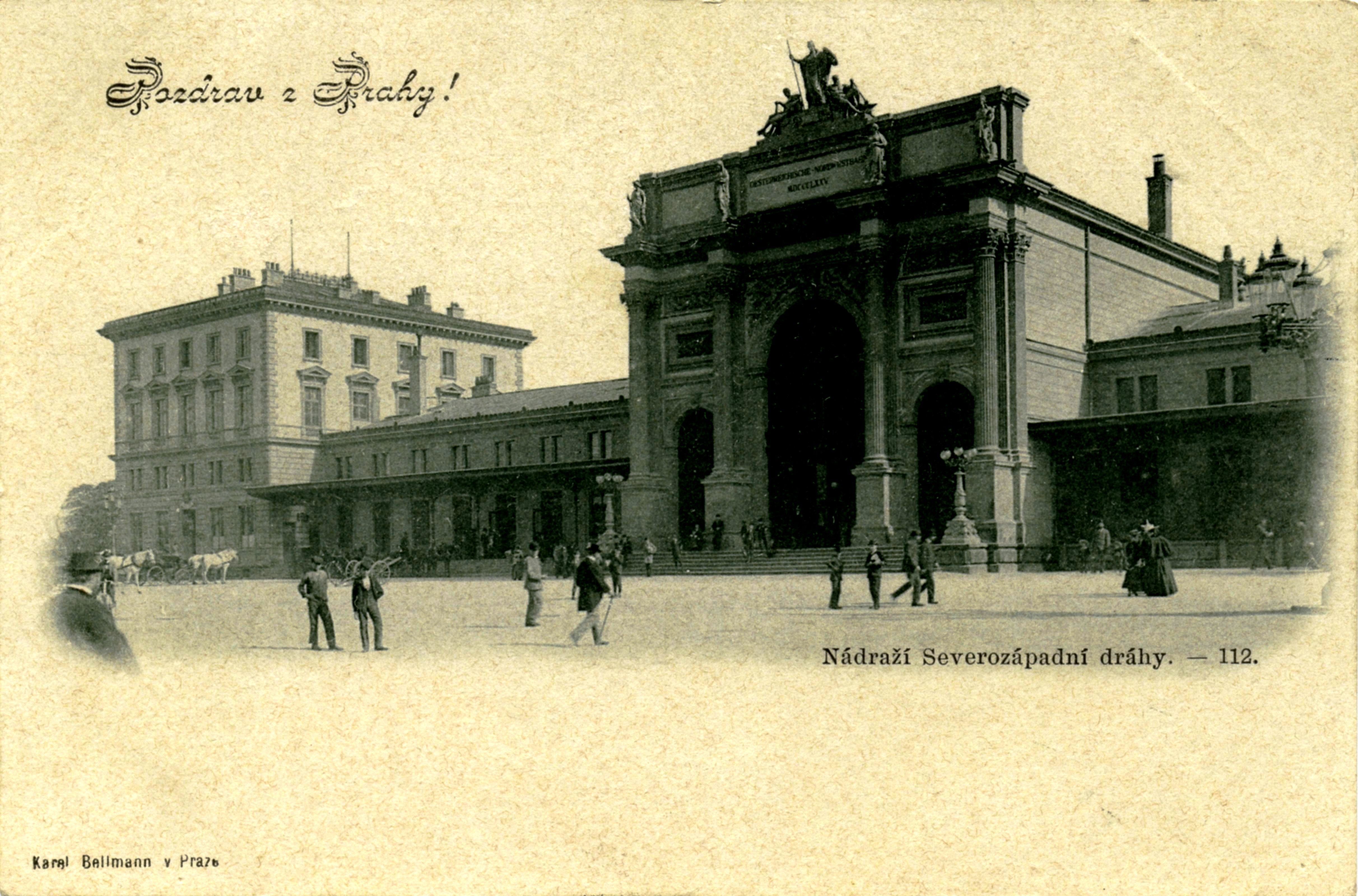 Nádraží Praha-Těšnov v poslední čtvrtině 19. století